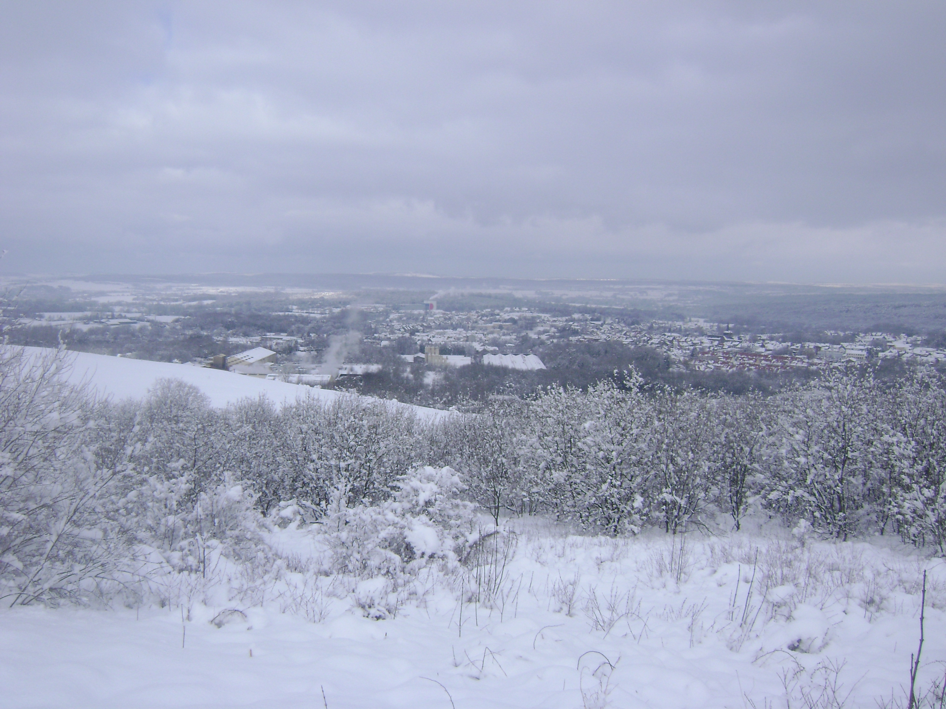 Vue de la ville de Desvres sous la neige depuis le mont Pelé